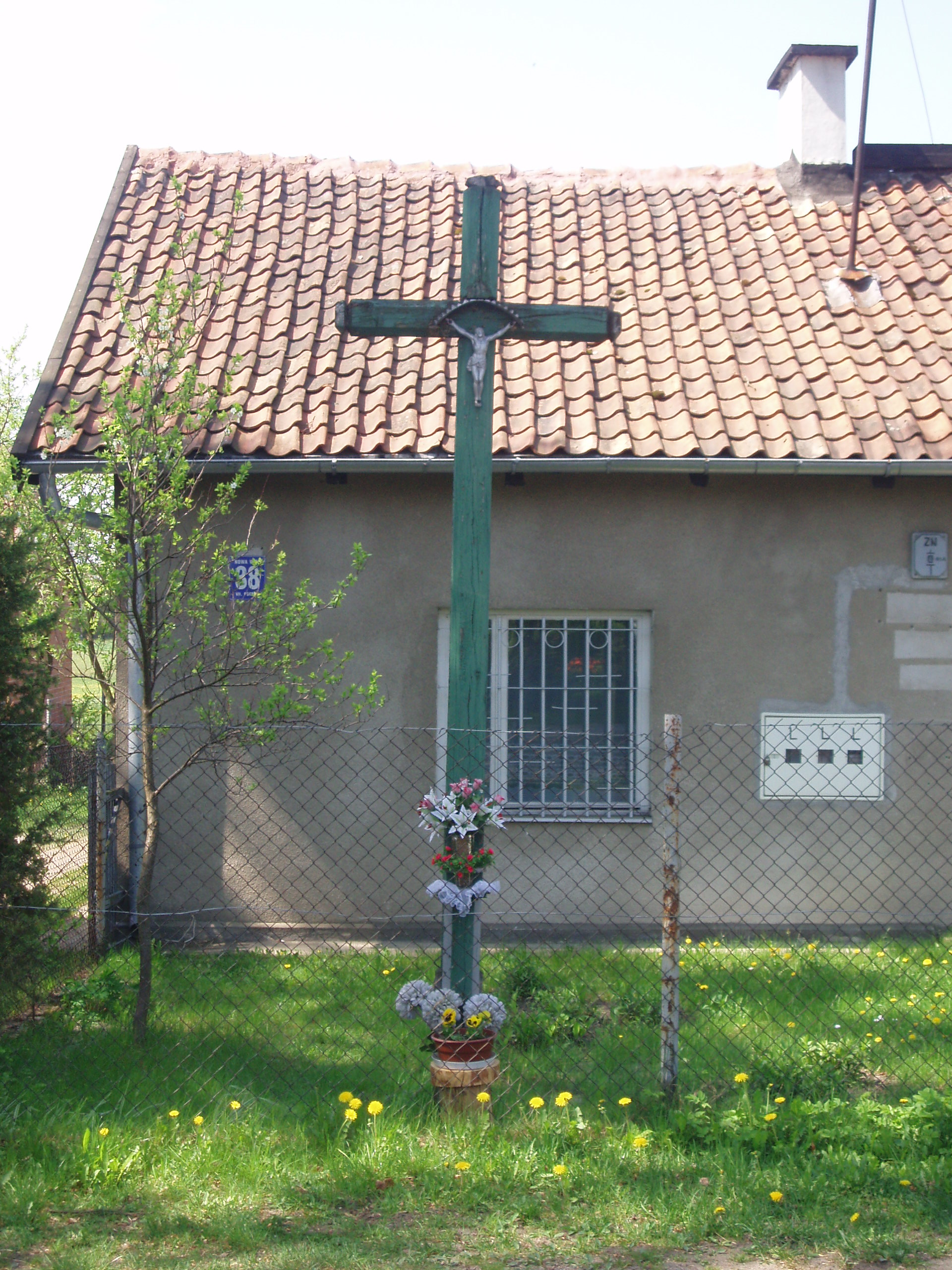 Nowa Wieś, przydrożny krzyż.